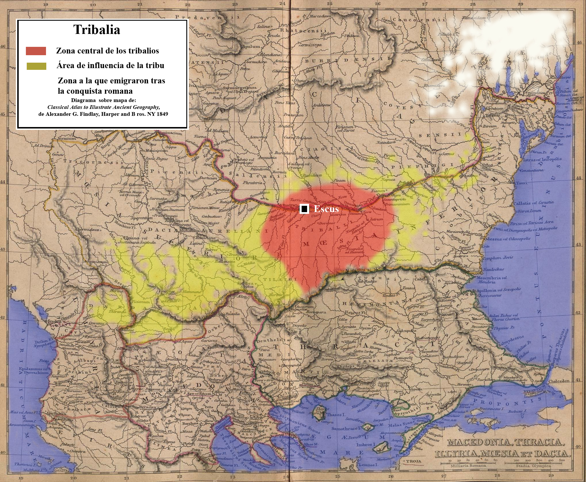 Diagrama de la zona ocupada por el pueblo tracio de los tribalios, hecho por wikipedista sobre mapa de copyright expirado (Classical Atlas to Illustrate Ancient Geography, Alexander G. Findlay, Harper and B ros. NY 1849). Wiki-work over ancient map of 1849, public domain.